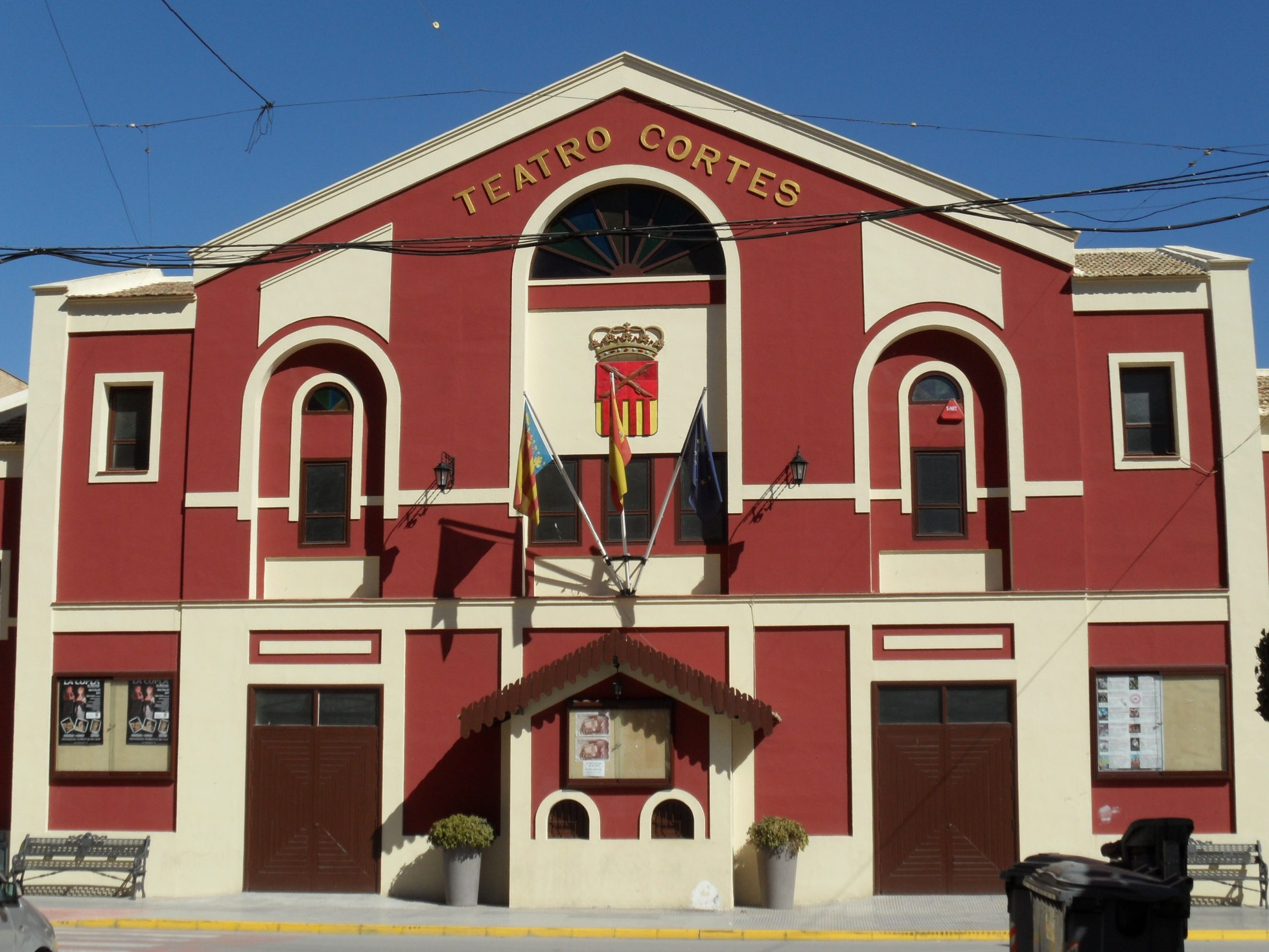 Teatro Cortés de Almoradí.